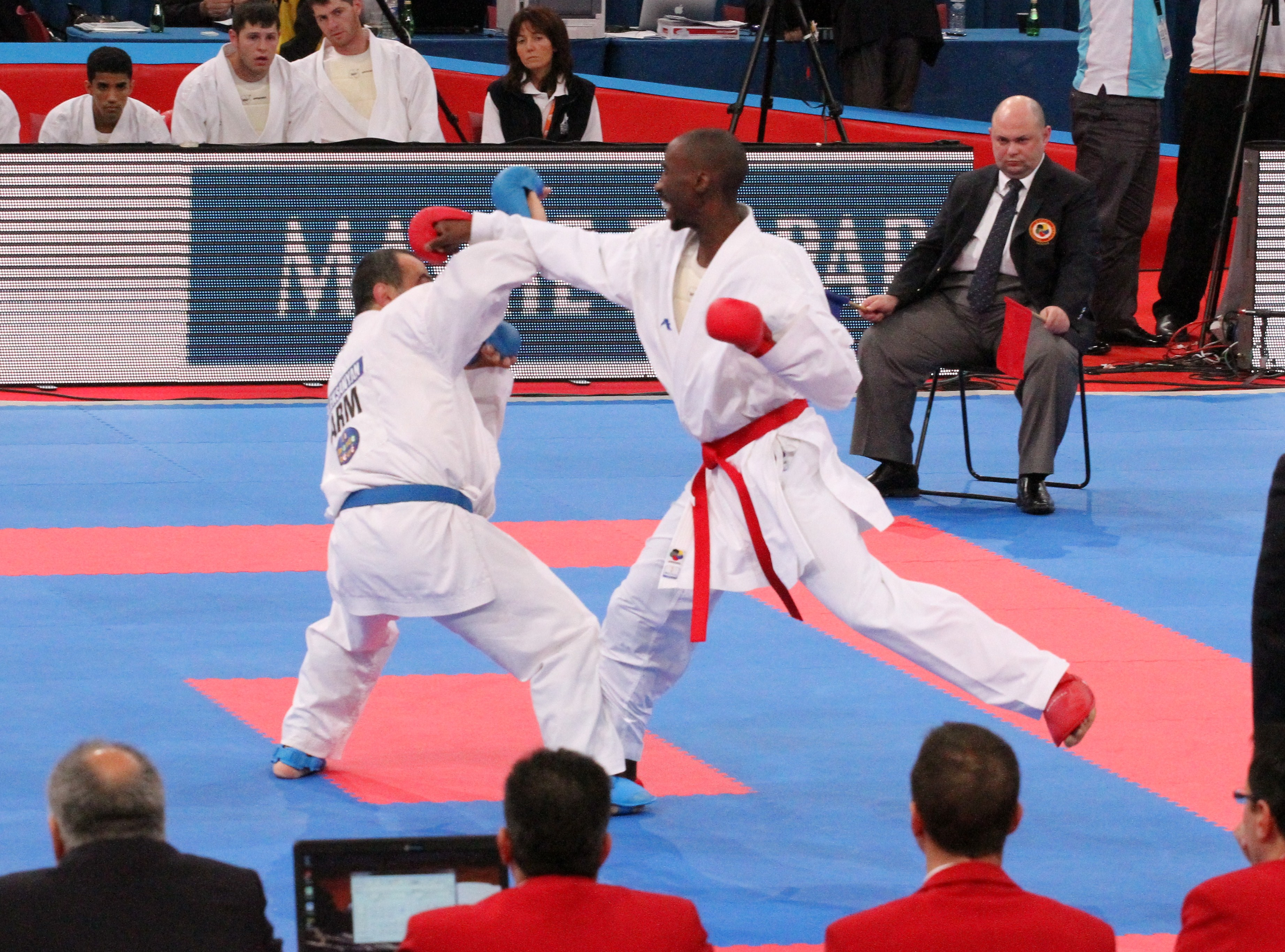 Karate